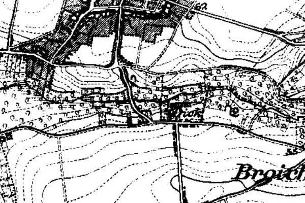 Neuaufnahme 1891 -1912